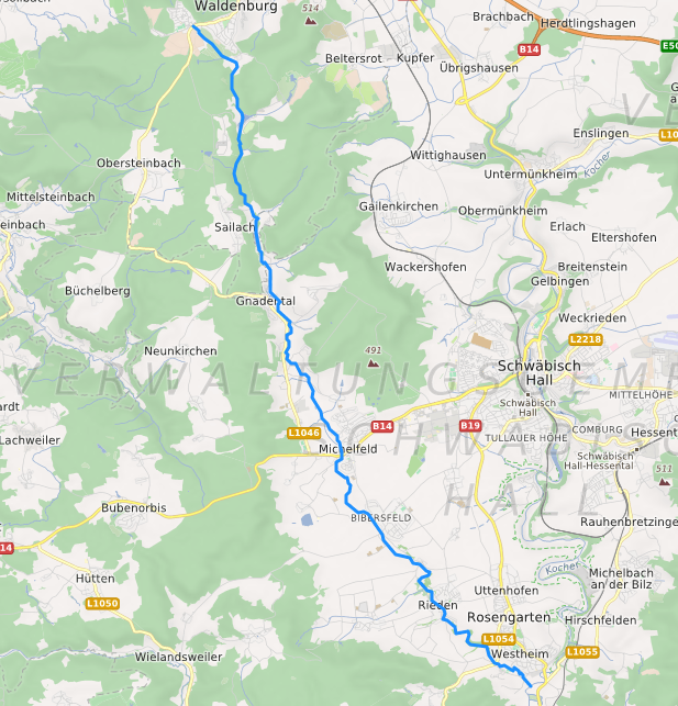 carte réalisée sur umap This map may be incomplete, and may contain errors. Don't rely solely on it for navigation.